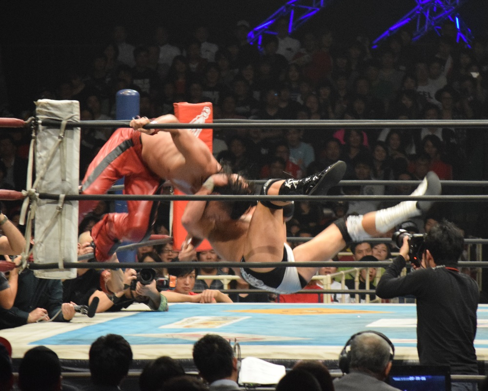 2015年11月7日 大阪府立体育会館 「POWER STRUGGLE」 中邑真輔にガン・スタンを放つカール・アンダーソン